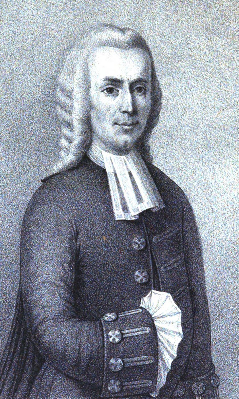 Petrus Wierdsma. Ferneamd Frysk rjochtsgelearde, berne yn 1729 en ferstoarn yn 1811 yn Ljouwert.